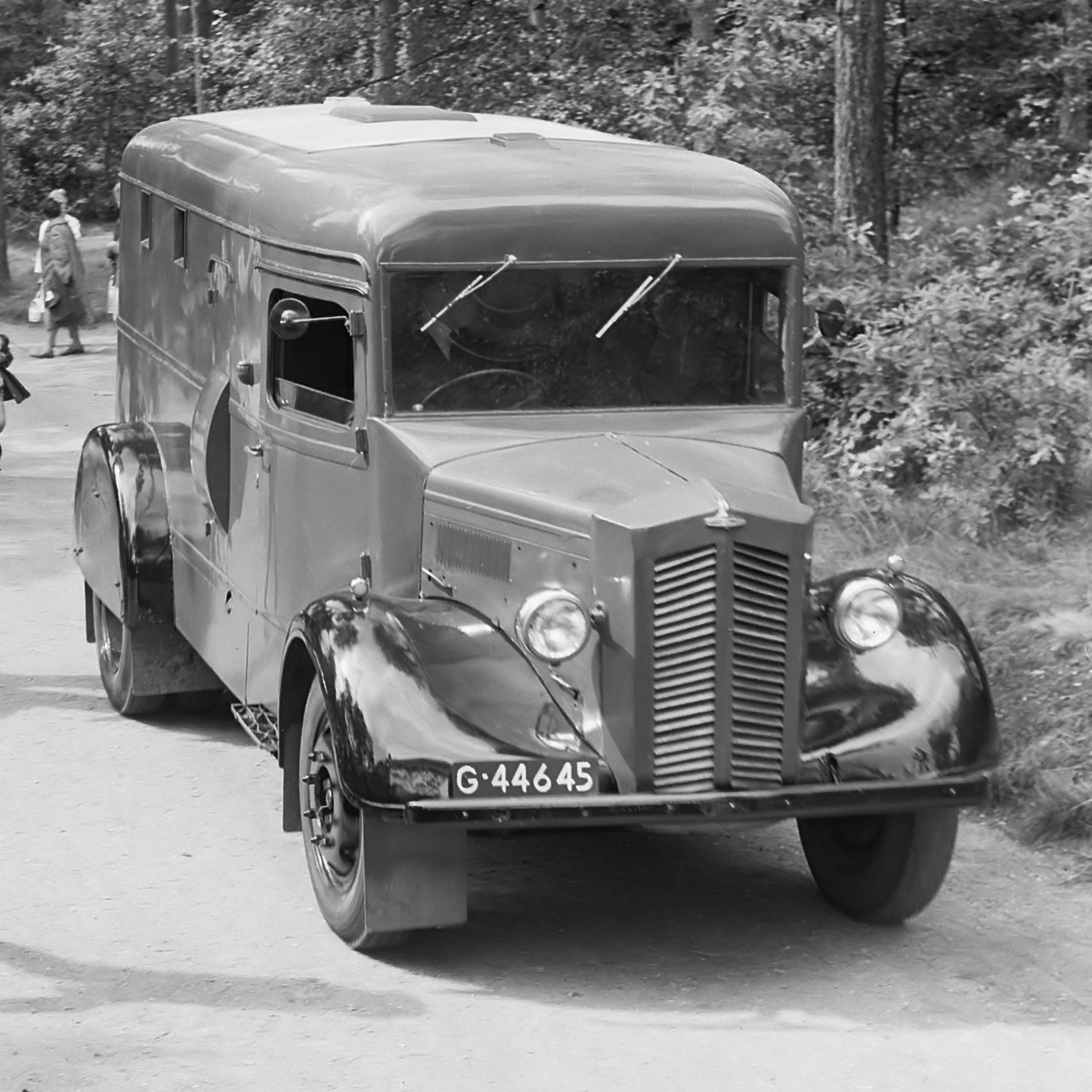 Prinselijke pantserauto in museum Overloon 25 augustus 1962